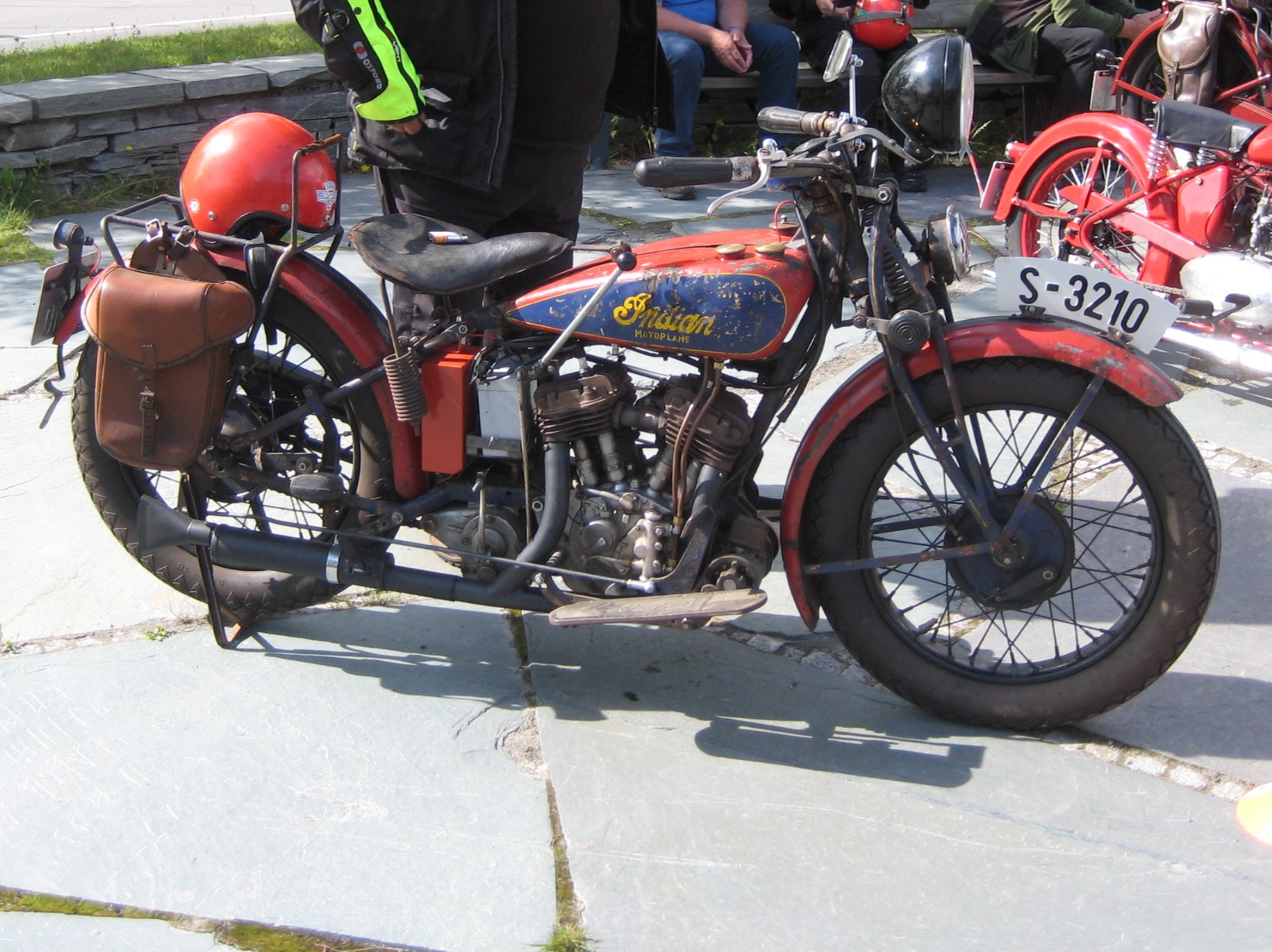 750 ccm Indian Motoplane. Indian Summer Meet 2014, Fagernes, Norway.